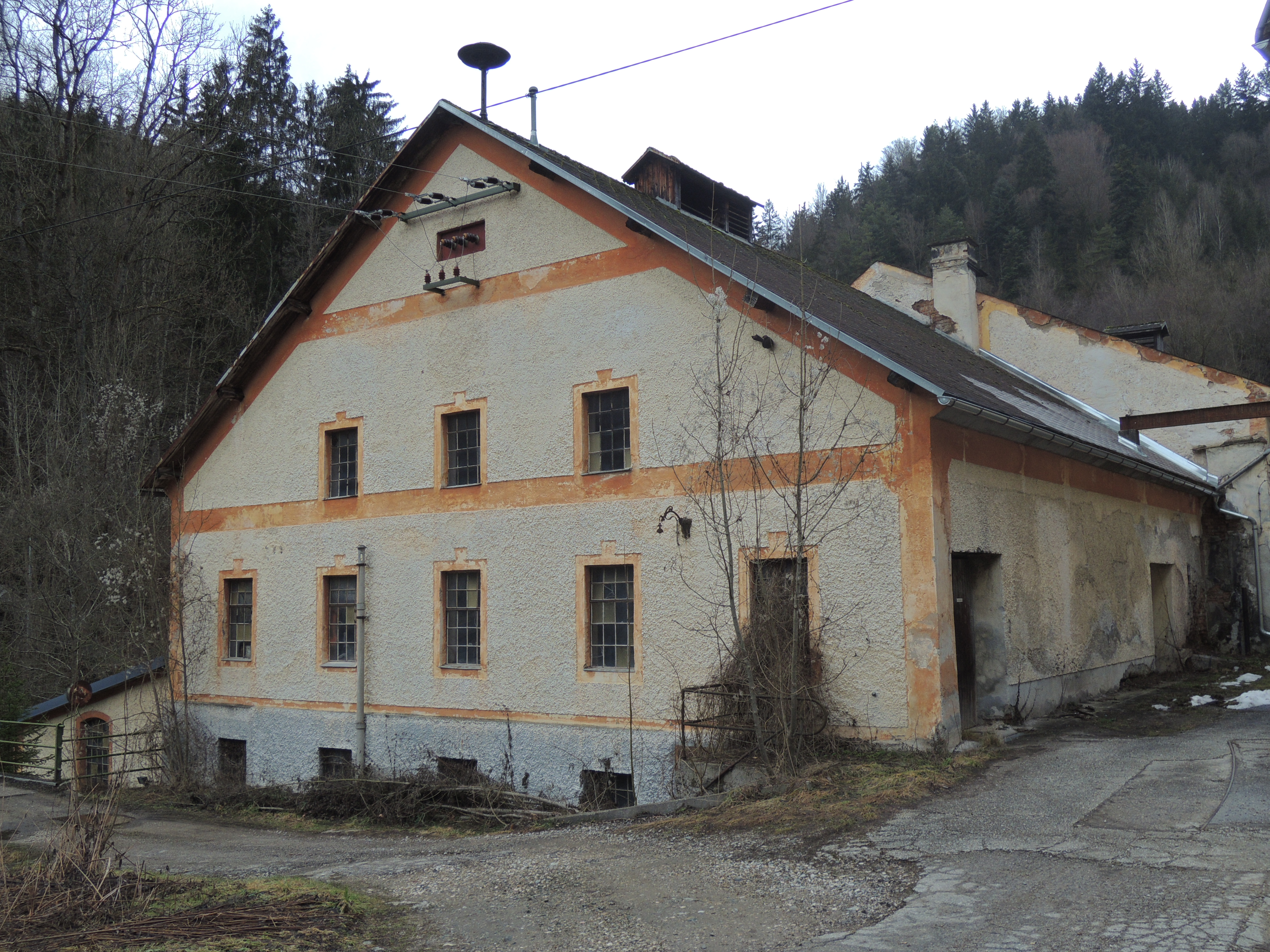 Die sogenannte B-Schleiferei der Papierfabrik, ehemals Höllmühle